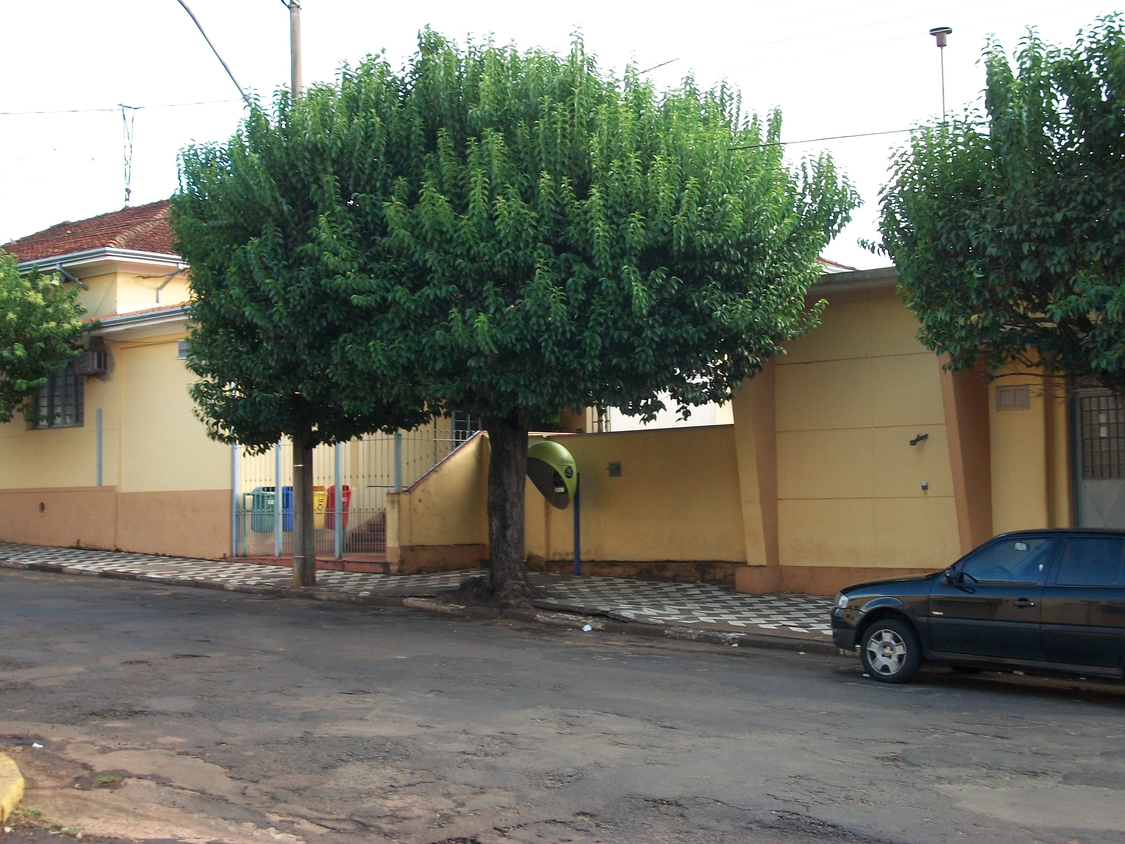 Stadtverwaltung von São Simão-SP, Brasilien; Februar von 2010.